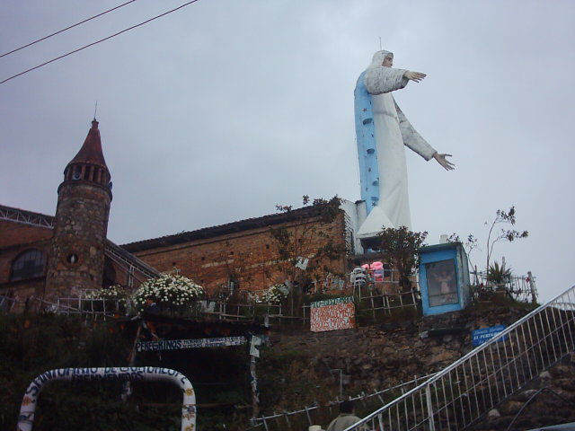 Guadalupe hill in Bogota